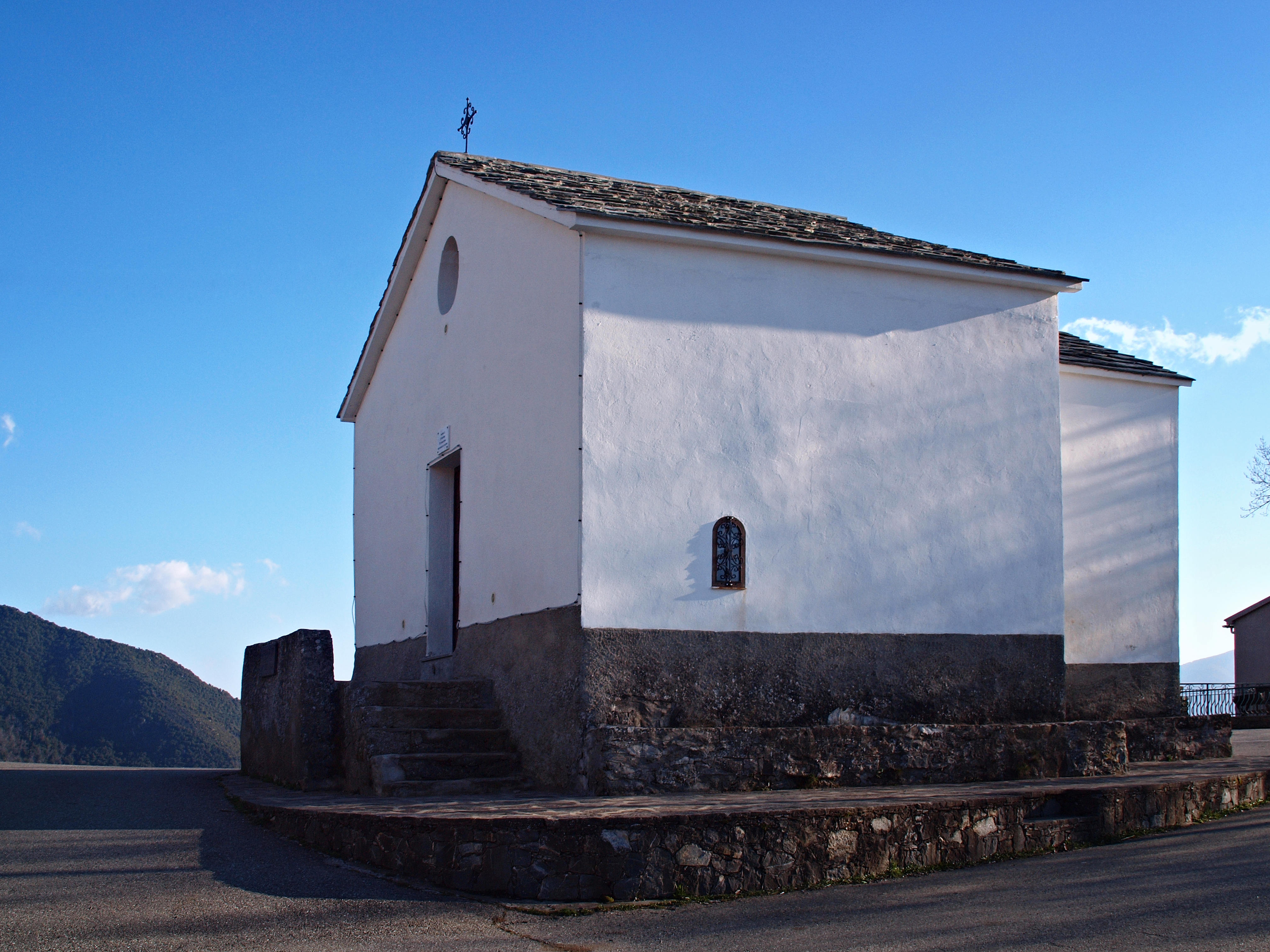 Erbajolo (Haute-Corse) - Chapelle Saint-Antoine Saint-Christophe Corsu: Erbaghjolu (Corsica) - Cappella San Cristofanu